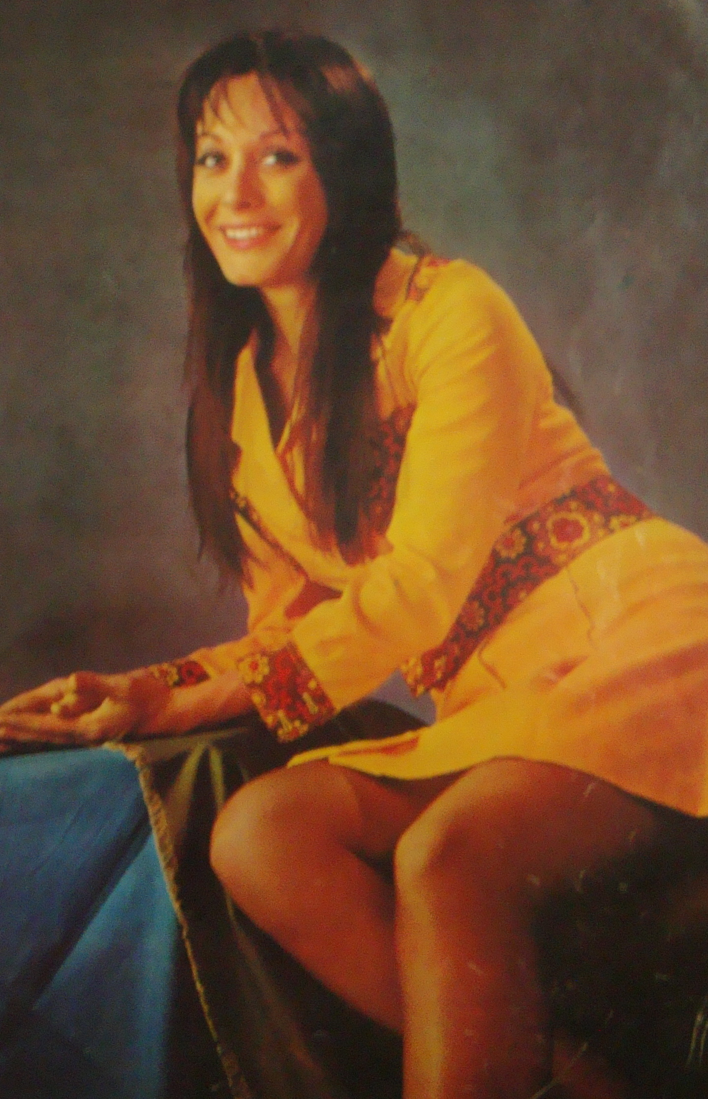 Thelma Biral en 1972.